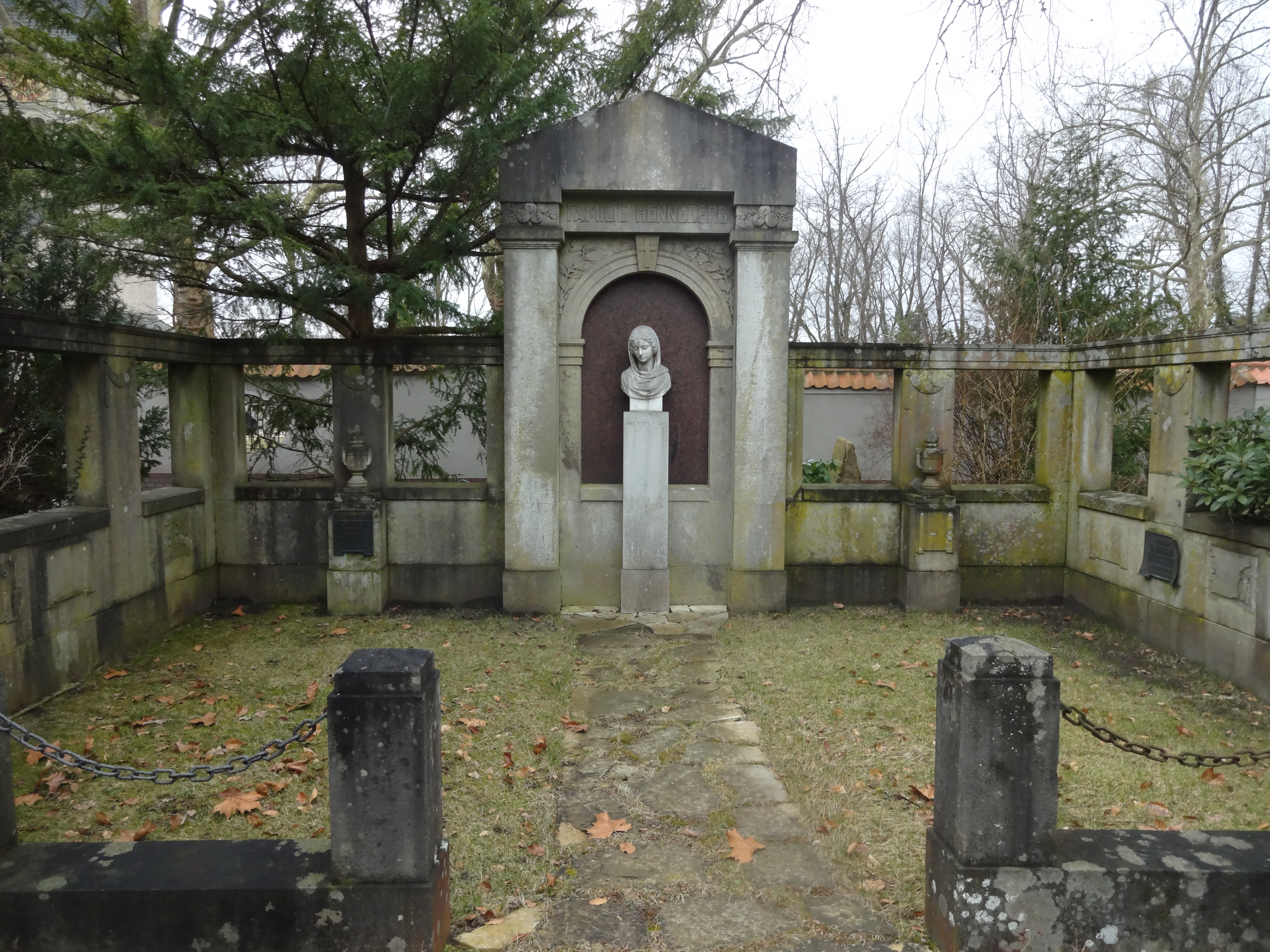 Grab Familie Henneberg auf dem Evangelischen Kirchhof Nikolassee in Berlin